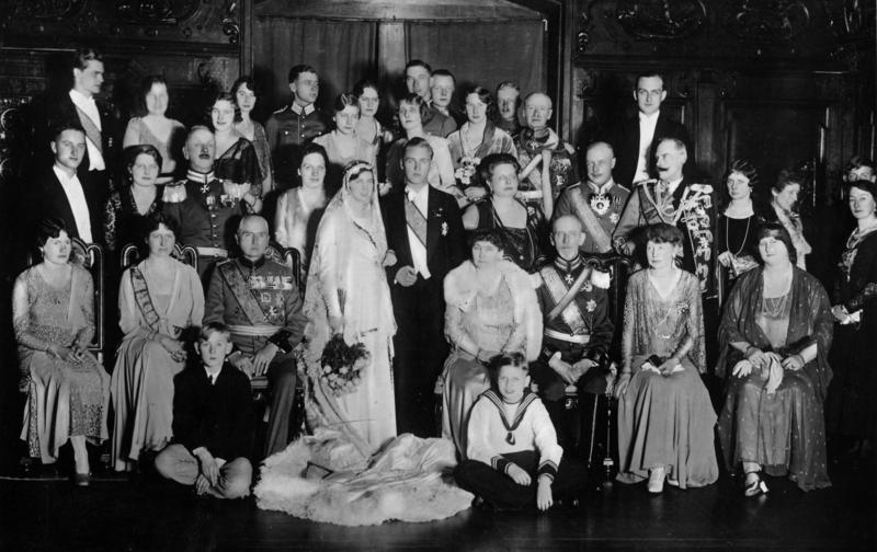 Hochzeit der Prinzessin v. Sachsen-Coburg-Gotha Hochzeit des Grafen Friedr. zu Castell-Rüdenhausen mit Prinzessin Caroline v. Sachsen-Coburg-Gotha ADN-ZB/Archiv: Hochzeit der Prinzessin Caroline Mathilde, zweite Tochter des Herzogs Karl Eduard von Sachsen-Koburg-Gotha, mit Graf Friedrich Wolfgang zu Castell-Rüdenhausen auf Schloß Greinburg bei Greien. 1. R. 3. v. l. Herzog Karl Eduard Aufn.: 1931 Abgebildete Personen: Sachsen-Coburg und Gotha, Karl-Eduard von: 1884-1954, Herzog, Präsident des Deutschen Roten Kreuzes, Deutschland